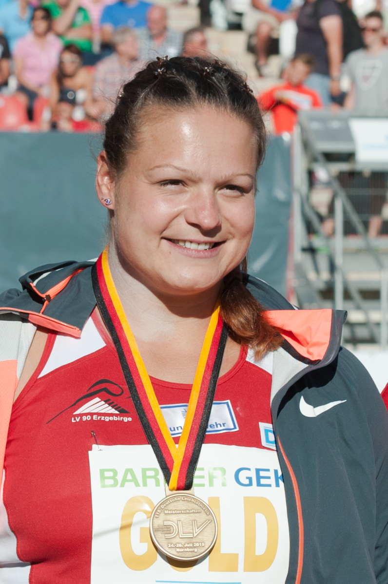 Deutsche Leichtathletik-Meisterschaften 2015: Christina Schwanitz, LV 90 Erzgebirge